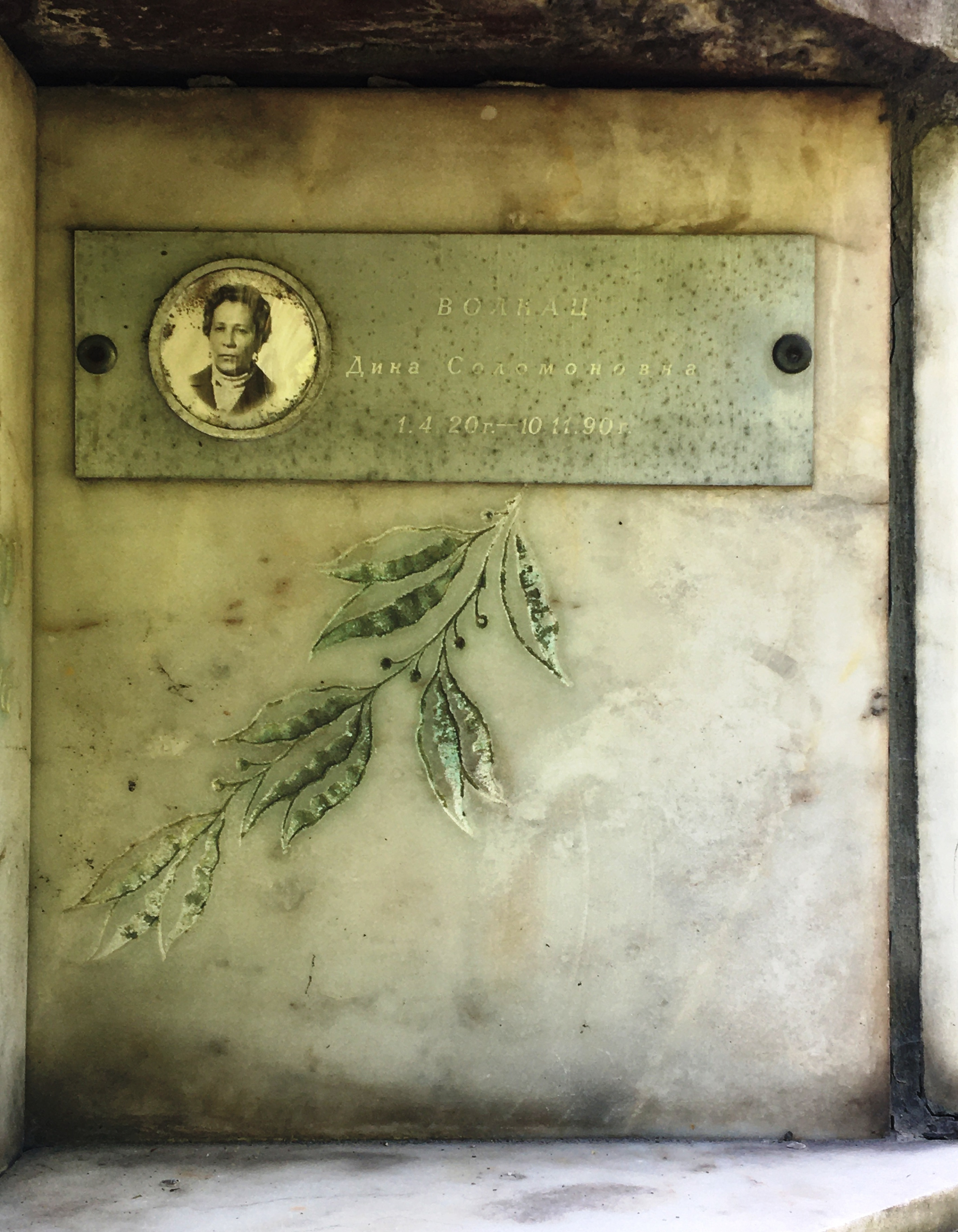 Плита на захоронении кинолога Дины Волкац в колумбарии Введенского кладбища.